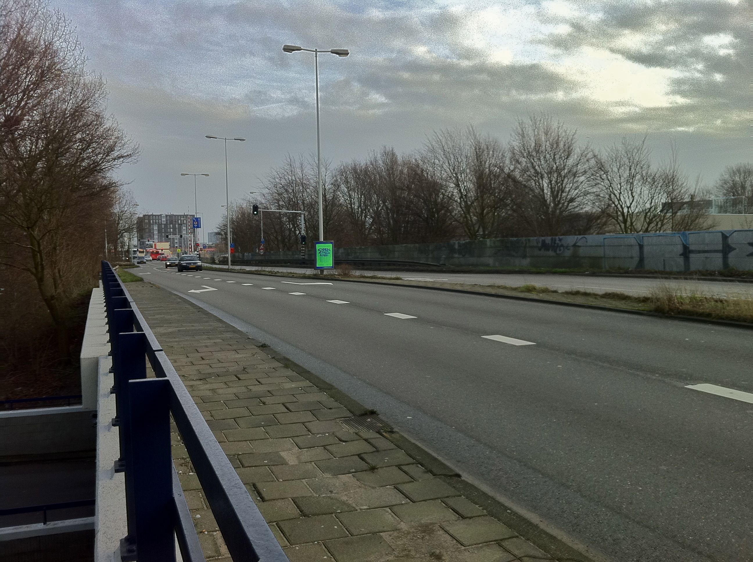 Amsterdam-Noord.